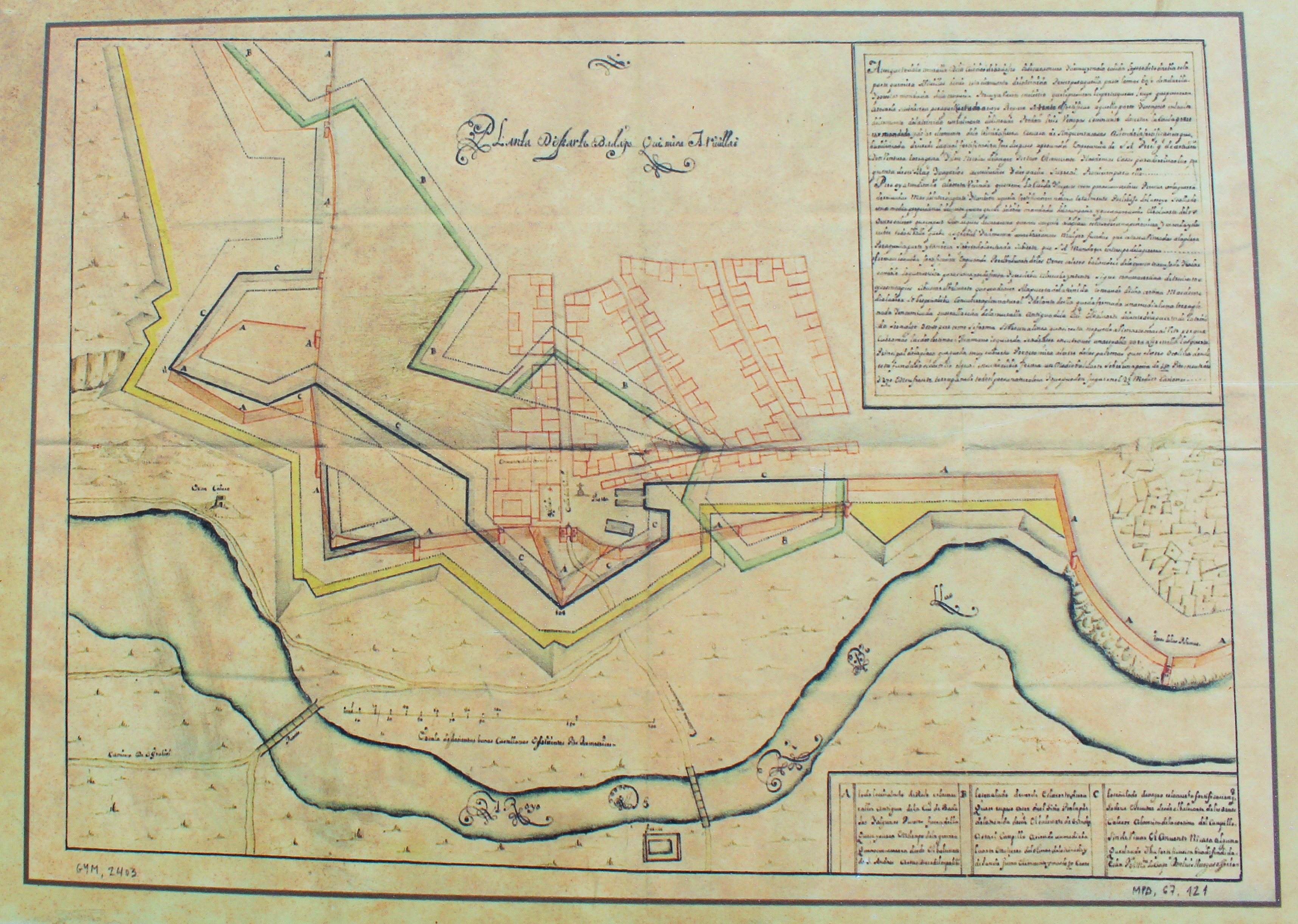 Antiguo plano de construcción del baluarte.